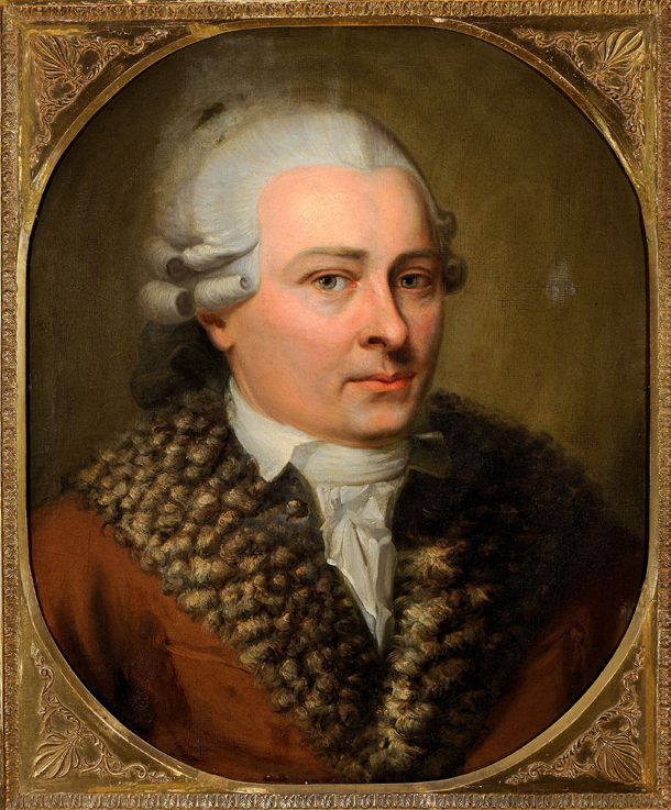 Portrait von David Roentgen (1743-1807) im Alter von etwa 45